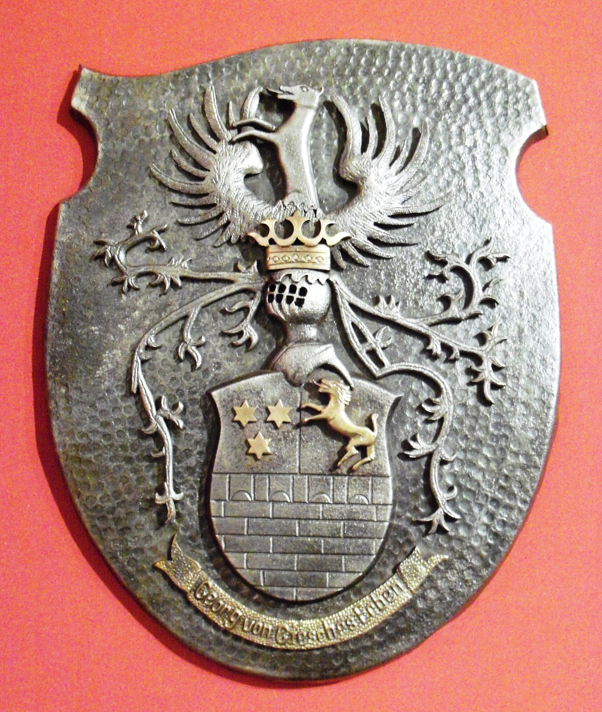 Herb Georg von Giesches Erben (pol. "Spadkobiercy Gieschego") pochodzący z druiej poł. XIX wieku, znajdujący się w Muzeum Historii Katowic. Zdjęcie wykonane w Muzeum Historii Katowic podczas Nocy Muzeów 2011